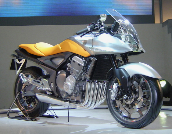 Suzuki STRATOSPHERE (2005 Tokyo Motor Show Suzuki concept model)